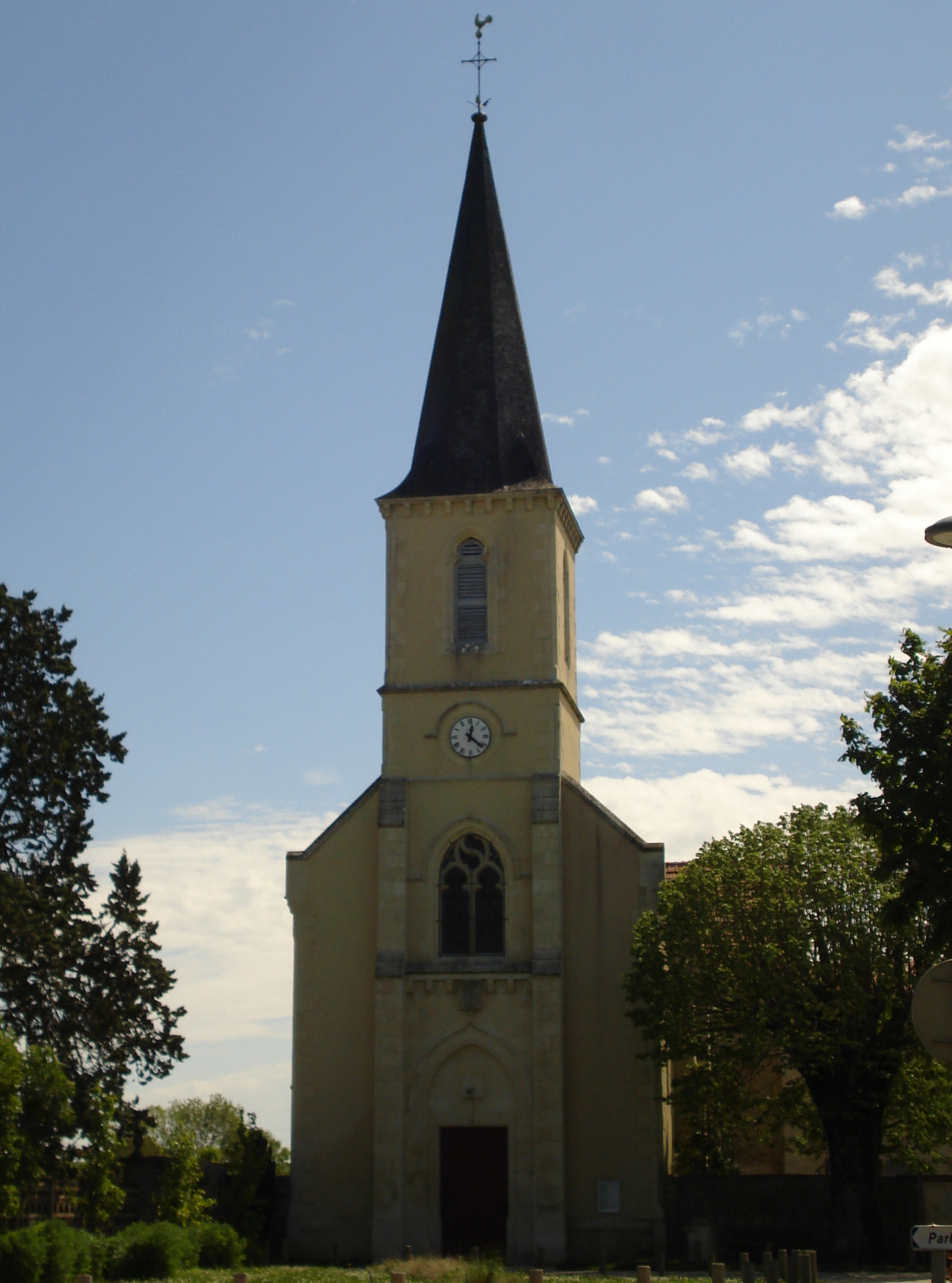 L'église d'Aubigné (Deux-Sèvres)